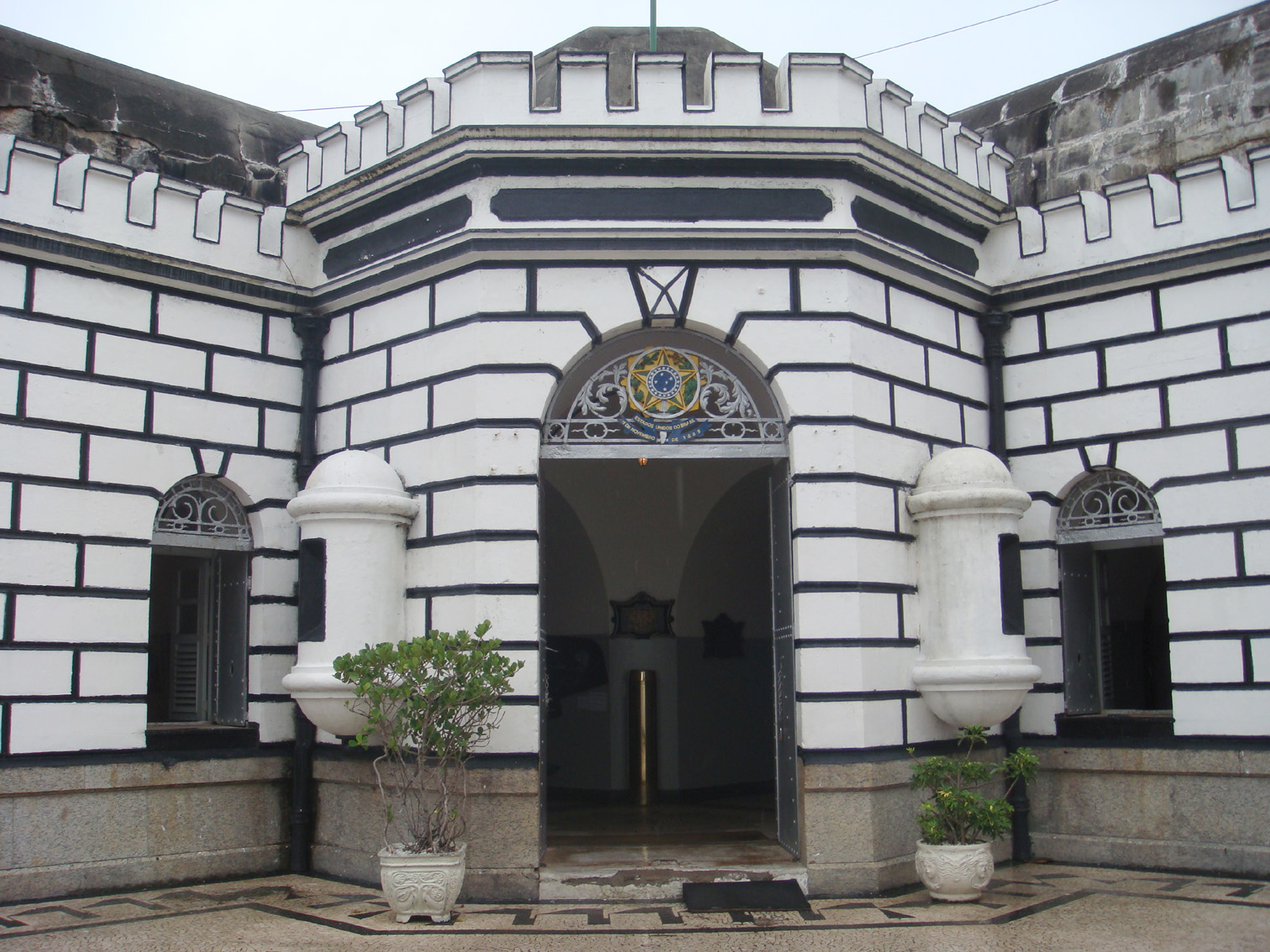 Entrance of Copacabana Fort, Rio de Janeiro, Brazil